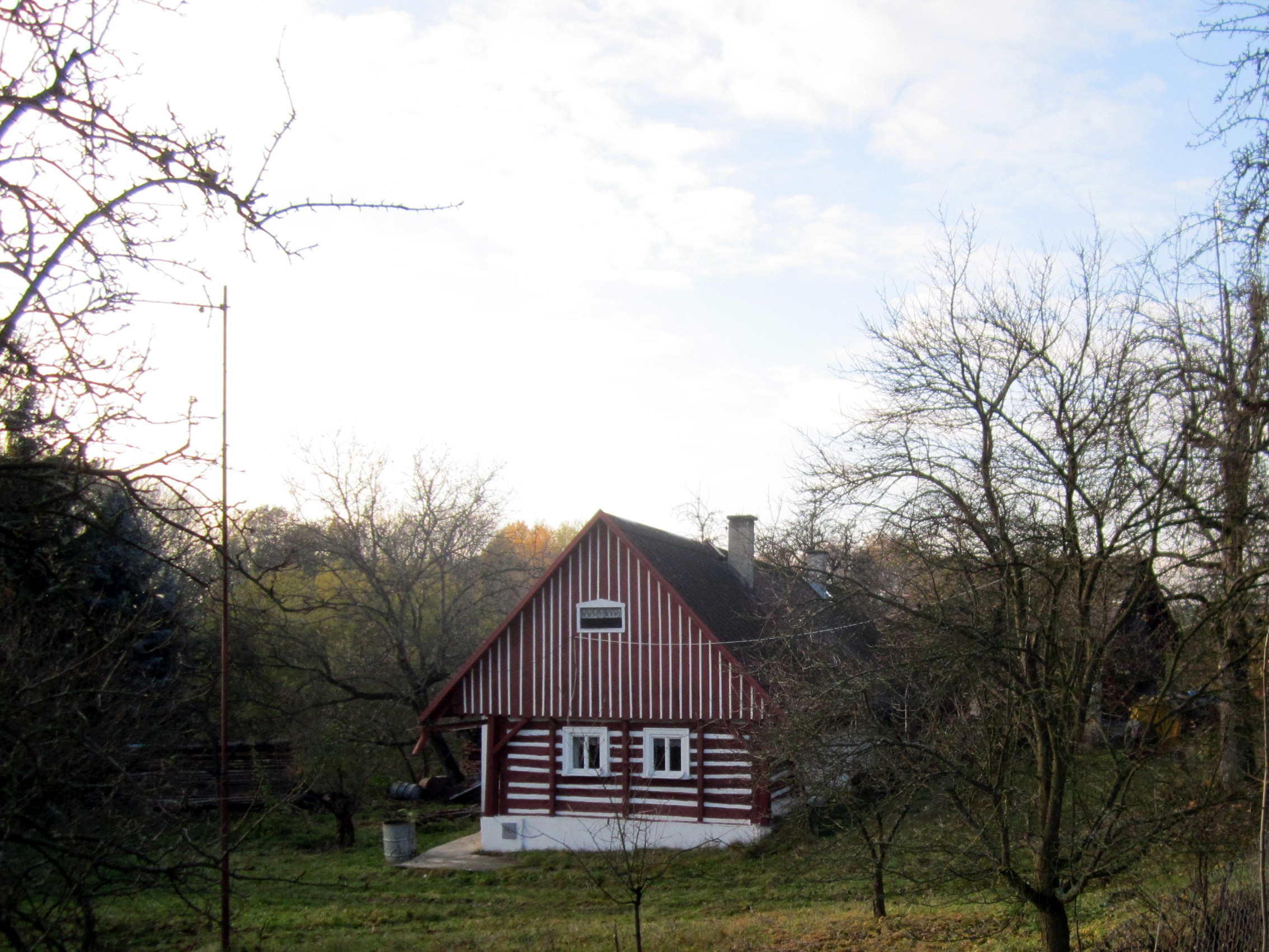 Dům čp. 1 v Albrechticích.